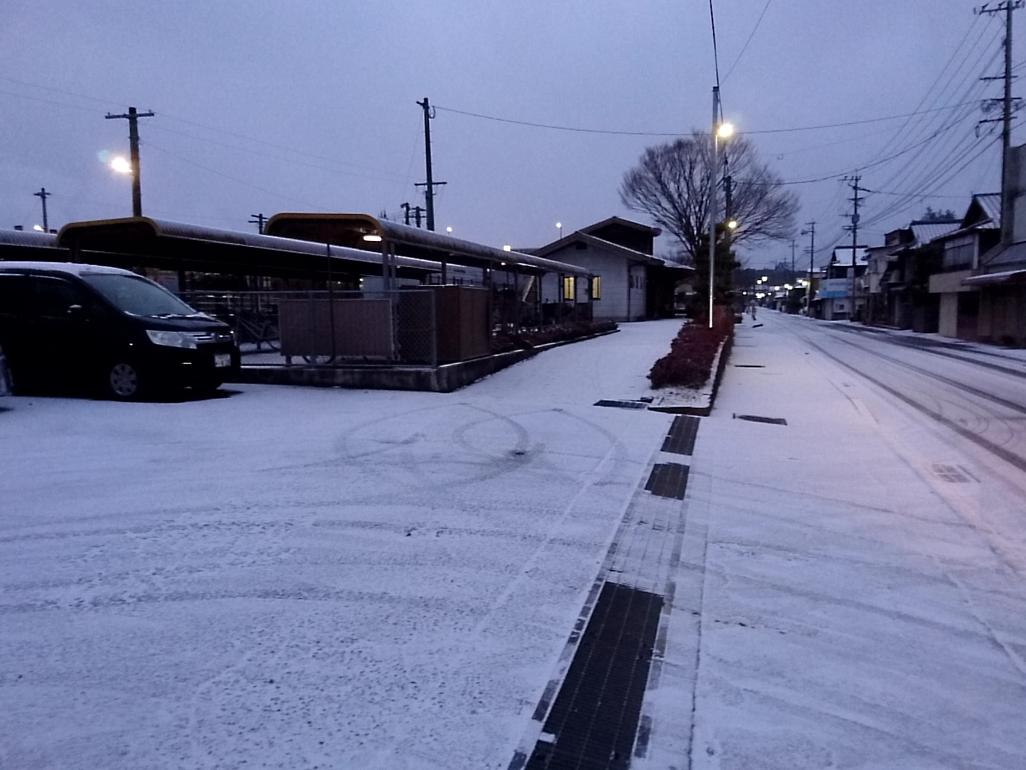 相知駅前の様子